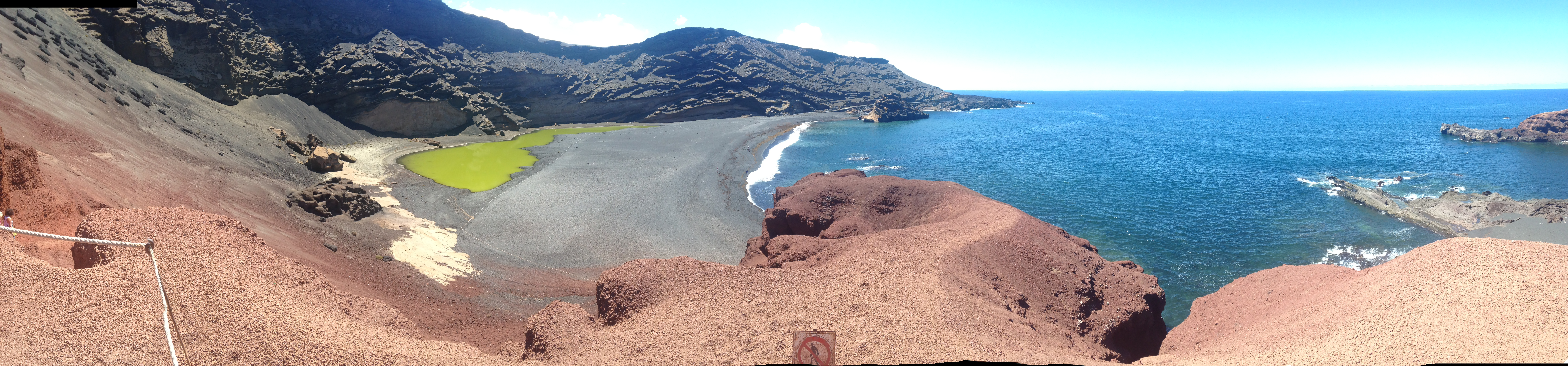 Charco verde en septiembre de 2014